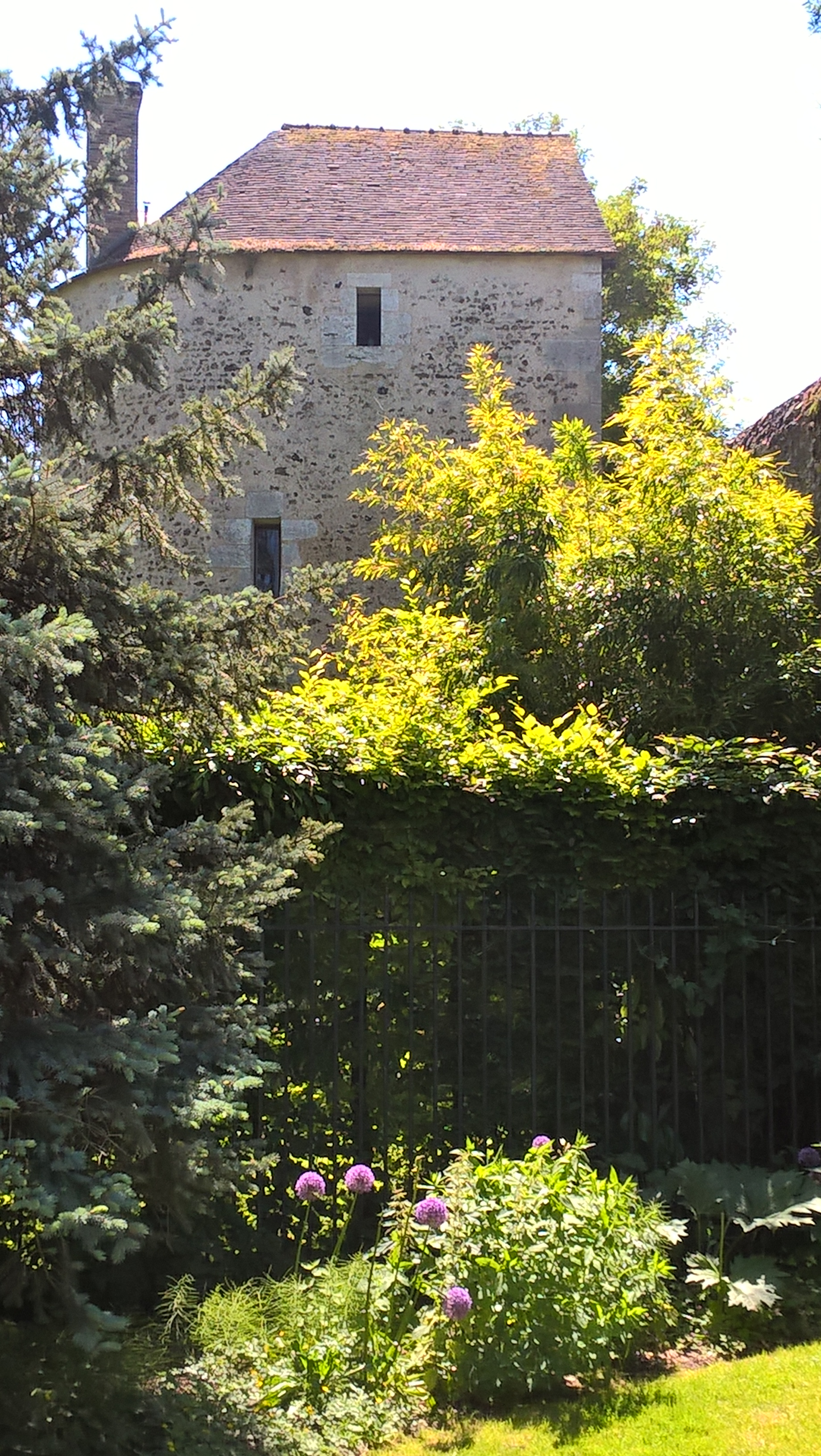 Fortifications de Chartres